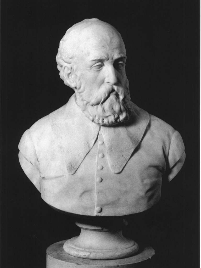 Busto di Andrea Palladio, opera di Eugenio Pedon del 1871. Il busto fa parte del Panteon Veneto, conservato presso Palazzo Loredan di Campo Santo Stefano a Venezia.